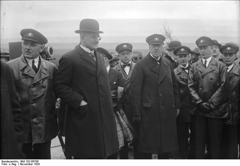 Der jubelnde Empfang des Luftschiffes "Graf Zeppelin" in der Reichshauptstadt Berlin! Der Oberbürgermeister Dr. Boess begrüßt den Führer des Luftschiffes Dr. Hugo Eckener nach seiner Landung in Staaken bei Berlin.